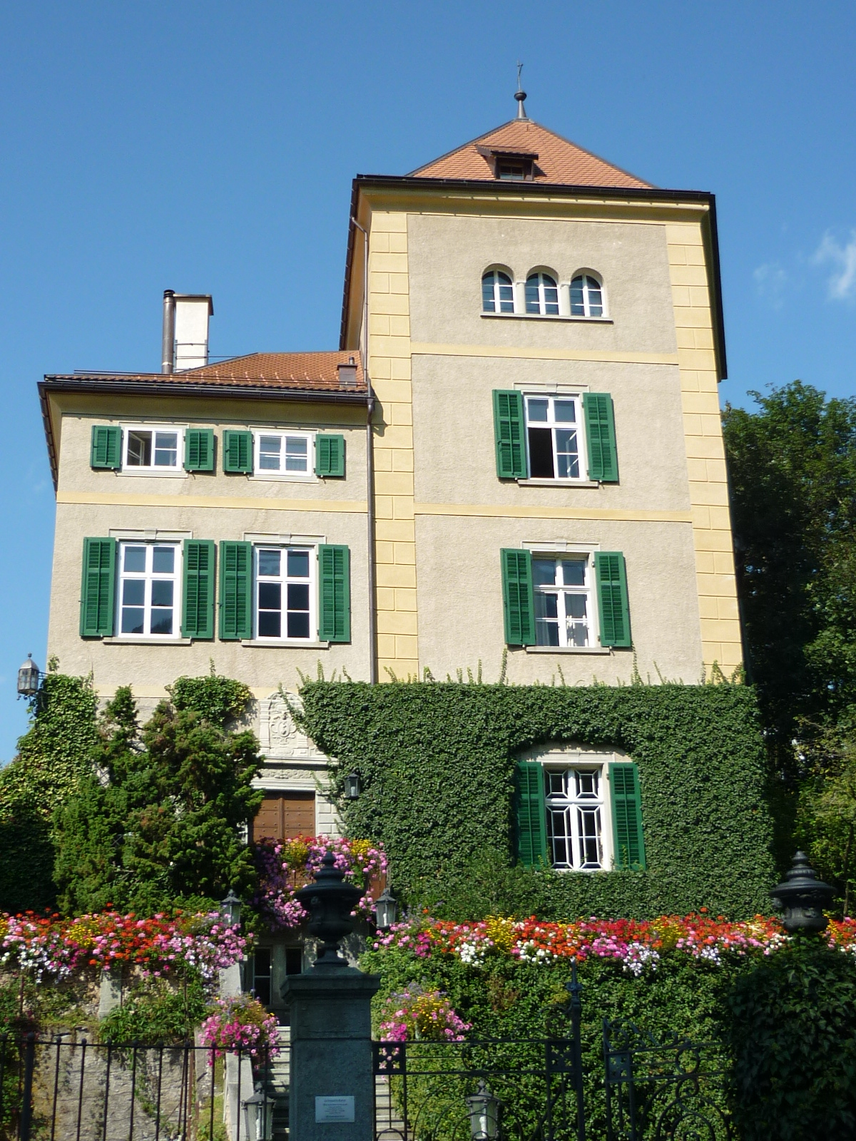 Schloss Schauenstein, Fürstenau GR, Schweiz